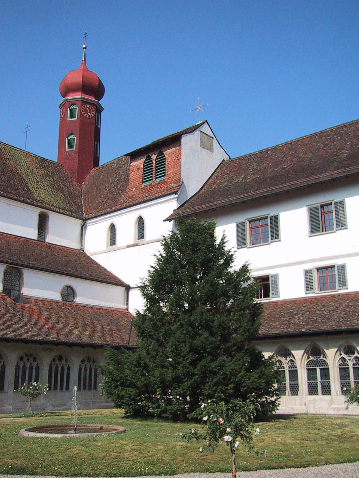 Wettingen, Ehemaliges Zisterzienserkloster Wettingen, Ansicht von der Mitte des Kreuzganges